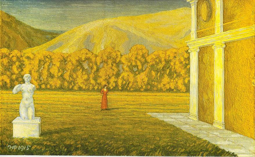 Николай Феофилактов "Пейзаж со скульптурой", 1915, Русский музей